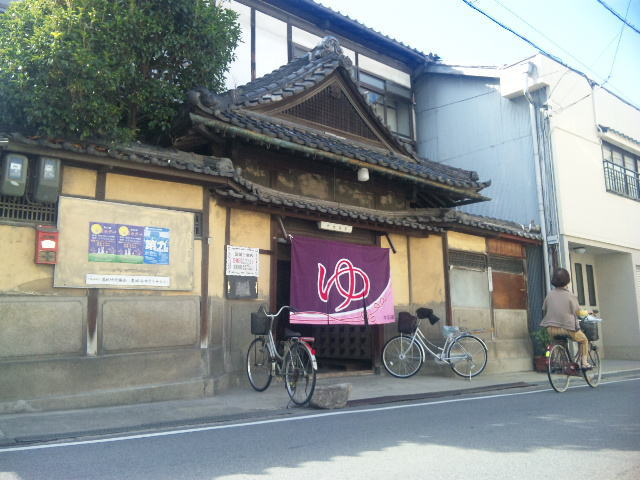 大和高田市の本郷通り商店街にある中央温泉（銭湯）。